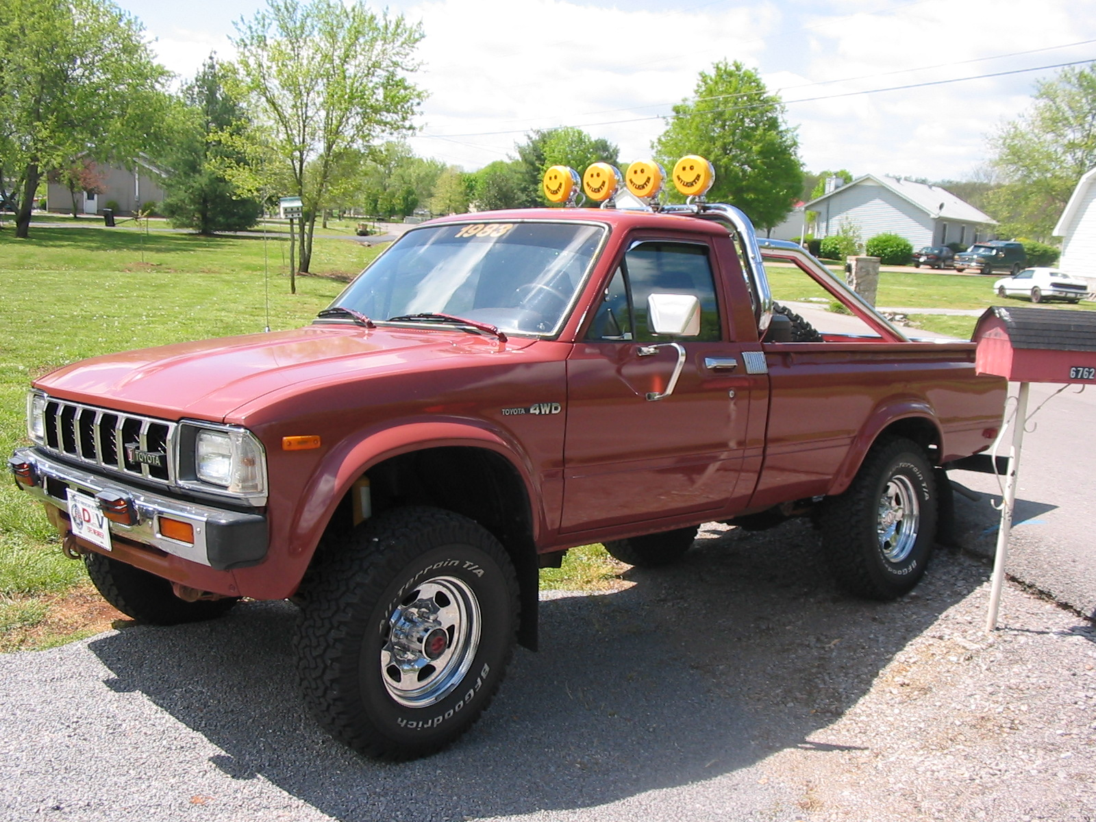 1983Toyota4X4SR5.jpg